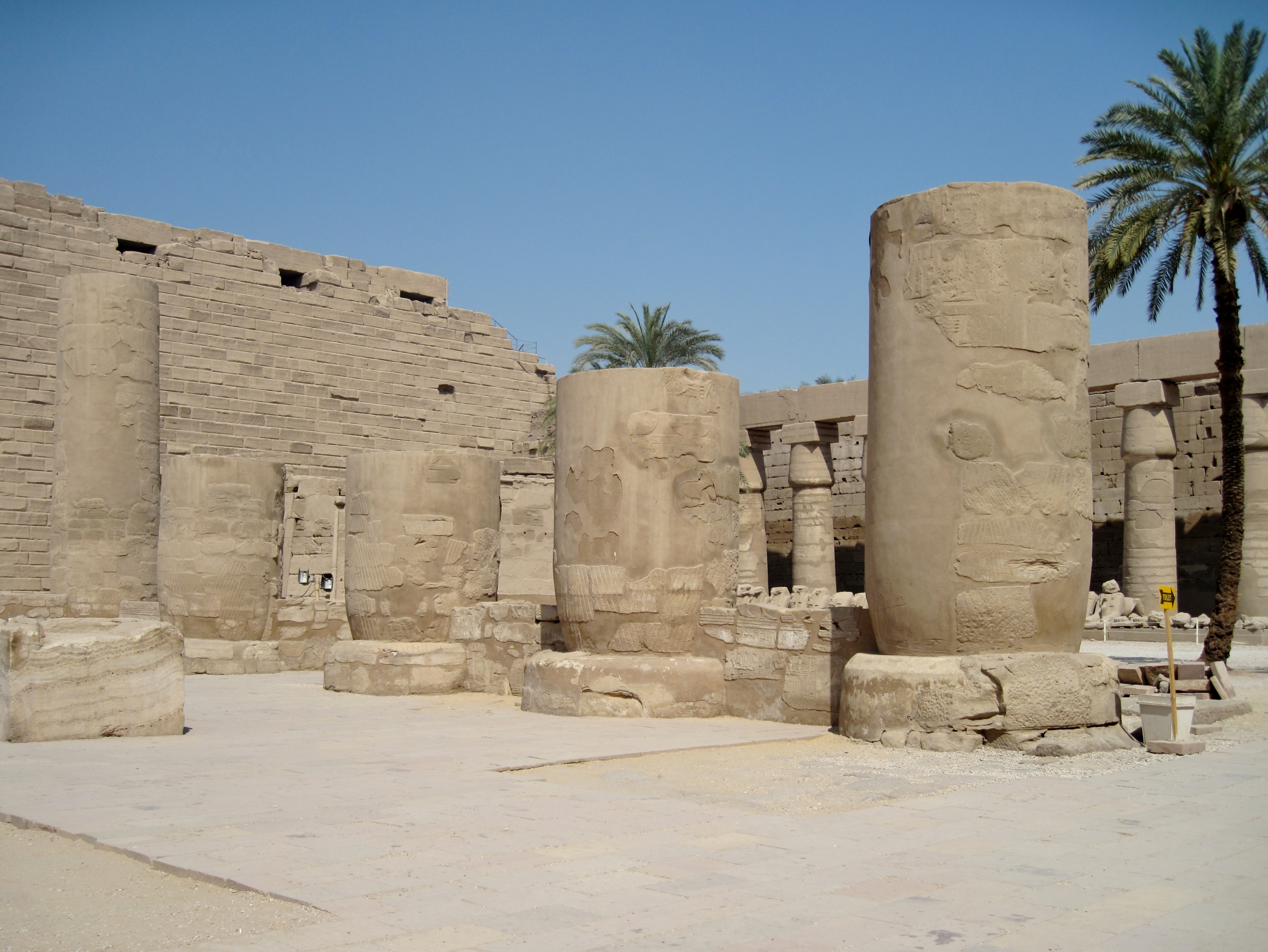 Erster Hof im Tempel von Karnak, nördlich von Luxor, Ägypten